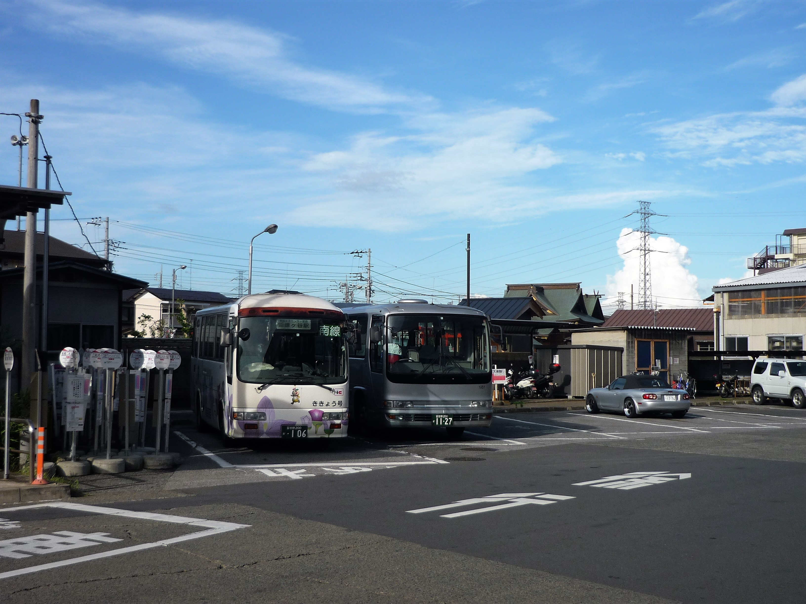 船橋新京成バス 鎌ヶ谷営業所